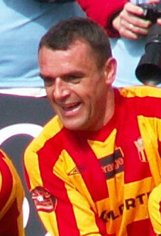 Grzegorz Piechna - polish soccer player